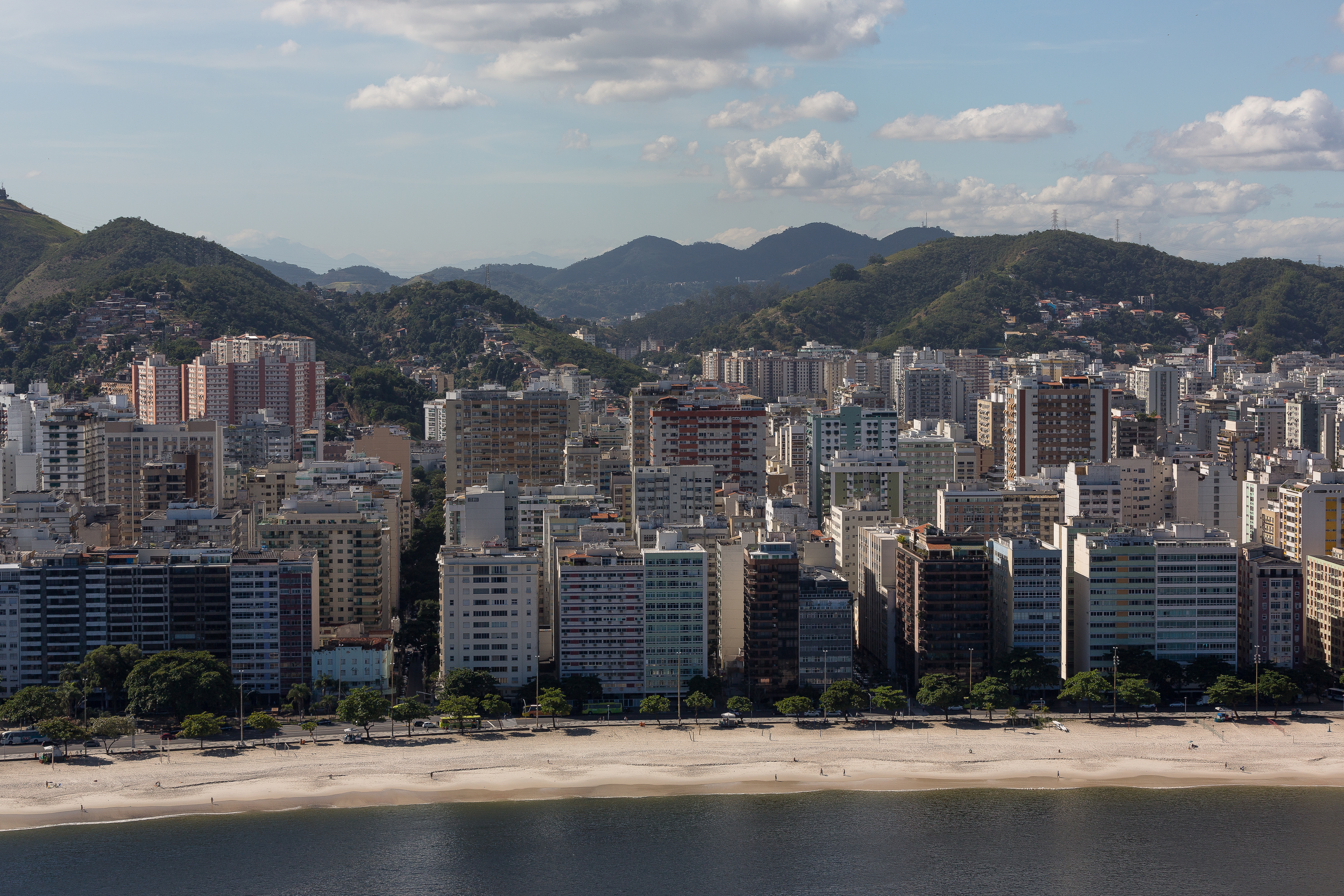 Vista aérea da Praia das Flechas localizada na cidade de Niterói, RJ - Brasil.